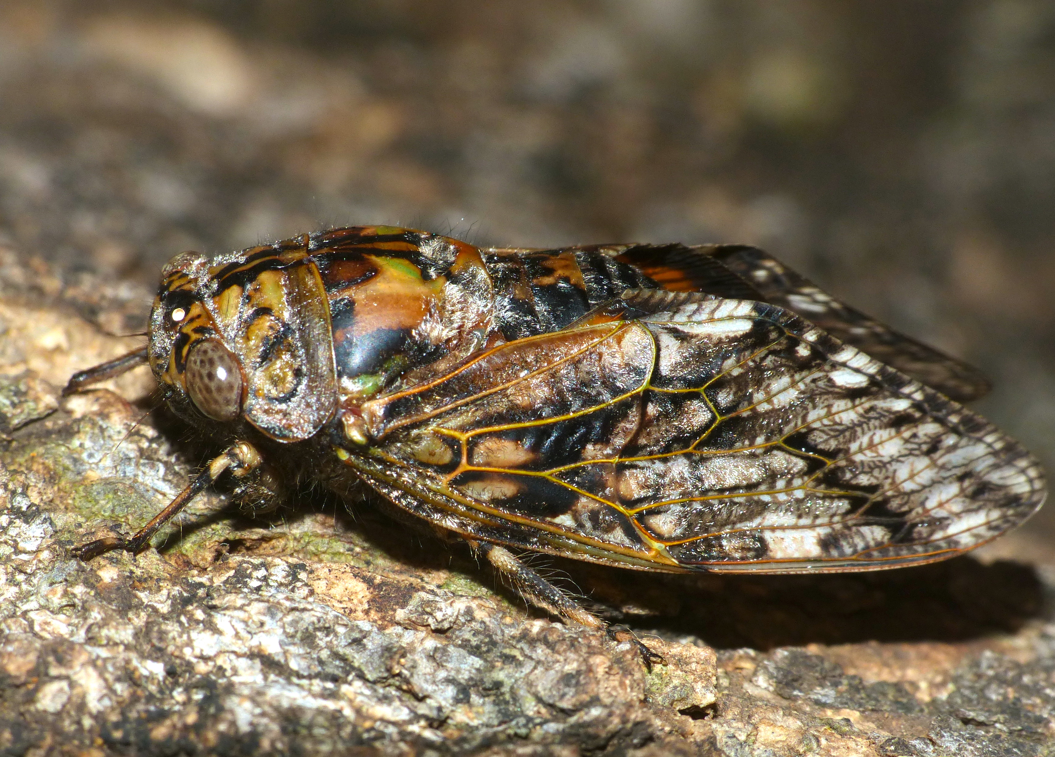 Letaba Camp, Kruger NP, SOUTH AFRICA